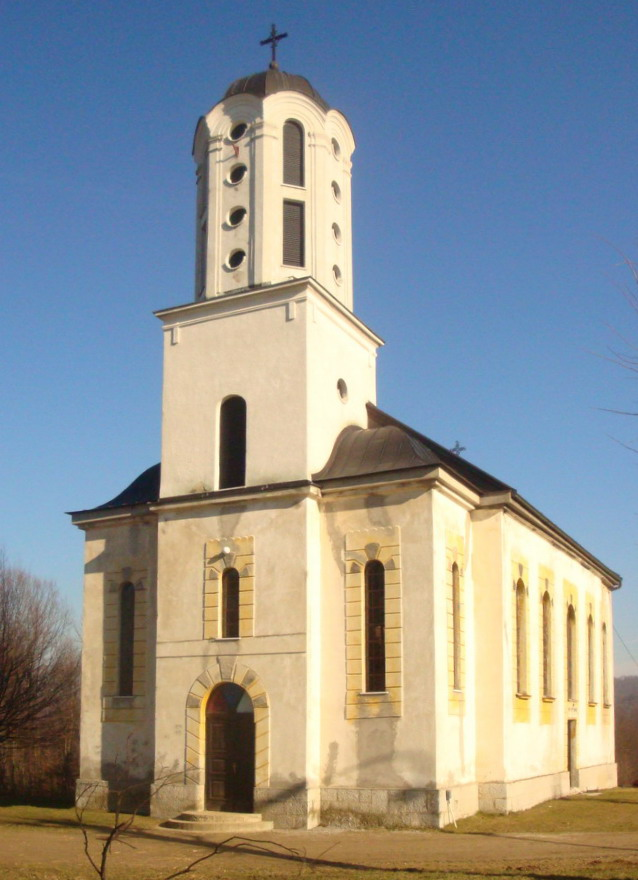 Храм_Вазнесења_Господњег_у_Колима